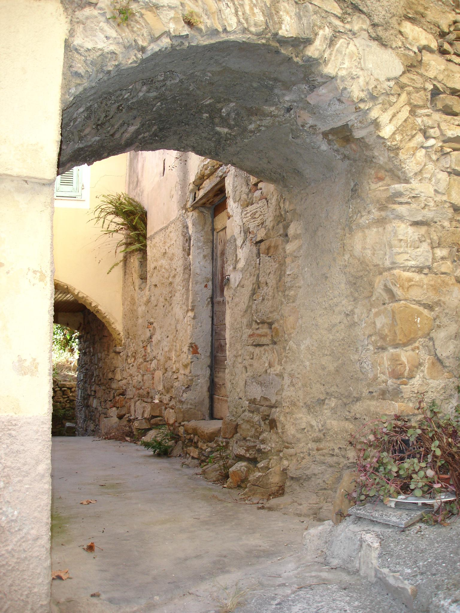 Autore Tony Frisina, 23 agosto 2007, Una gita a Diano San Pietro.